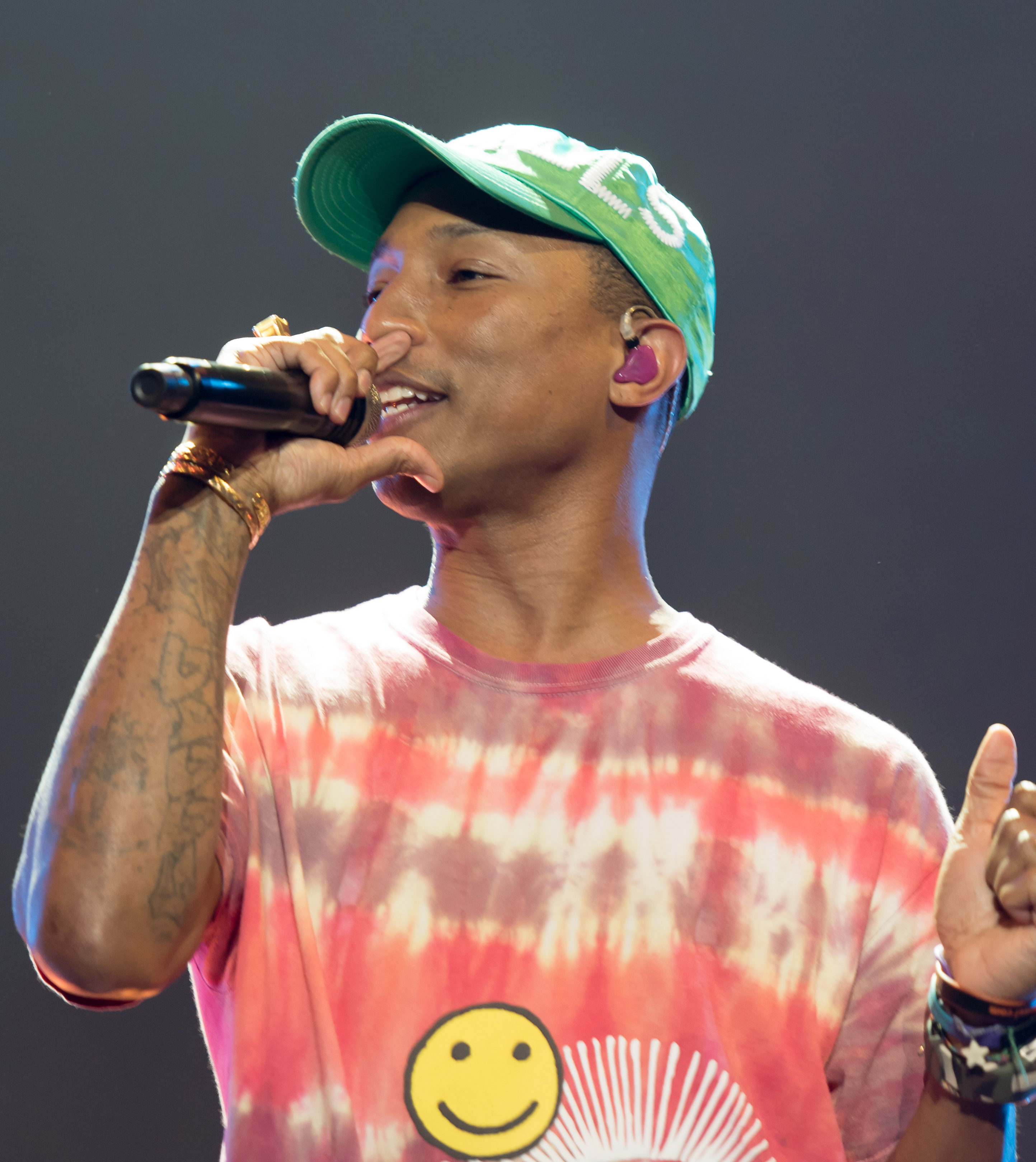 Pharrell Williams beim Global Citizen Festival in Hamburg